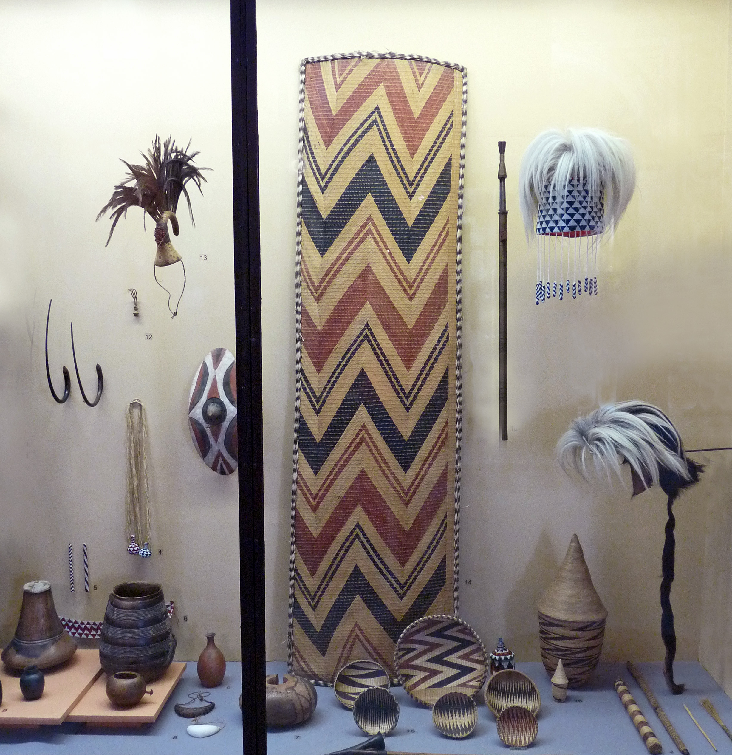 Vitrine dédiée au Rwanda et au Burundi. Musée royal de l'Afrique centrale